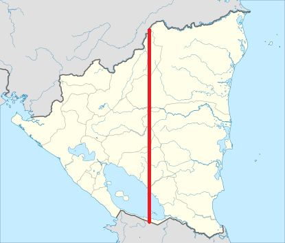 Esta mapa refleja la brecha demográfica que existe en Nicaragua. La línea divisoria divide el oeste (muy poblado) del este (muy despoblado)